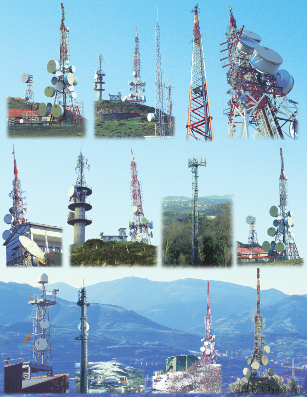 Antenak Euskal Herrian.